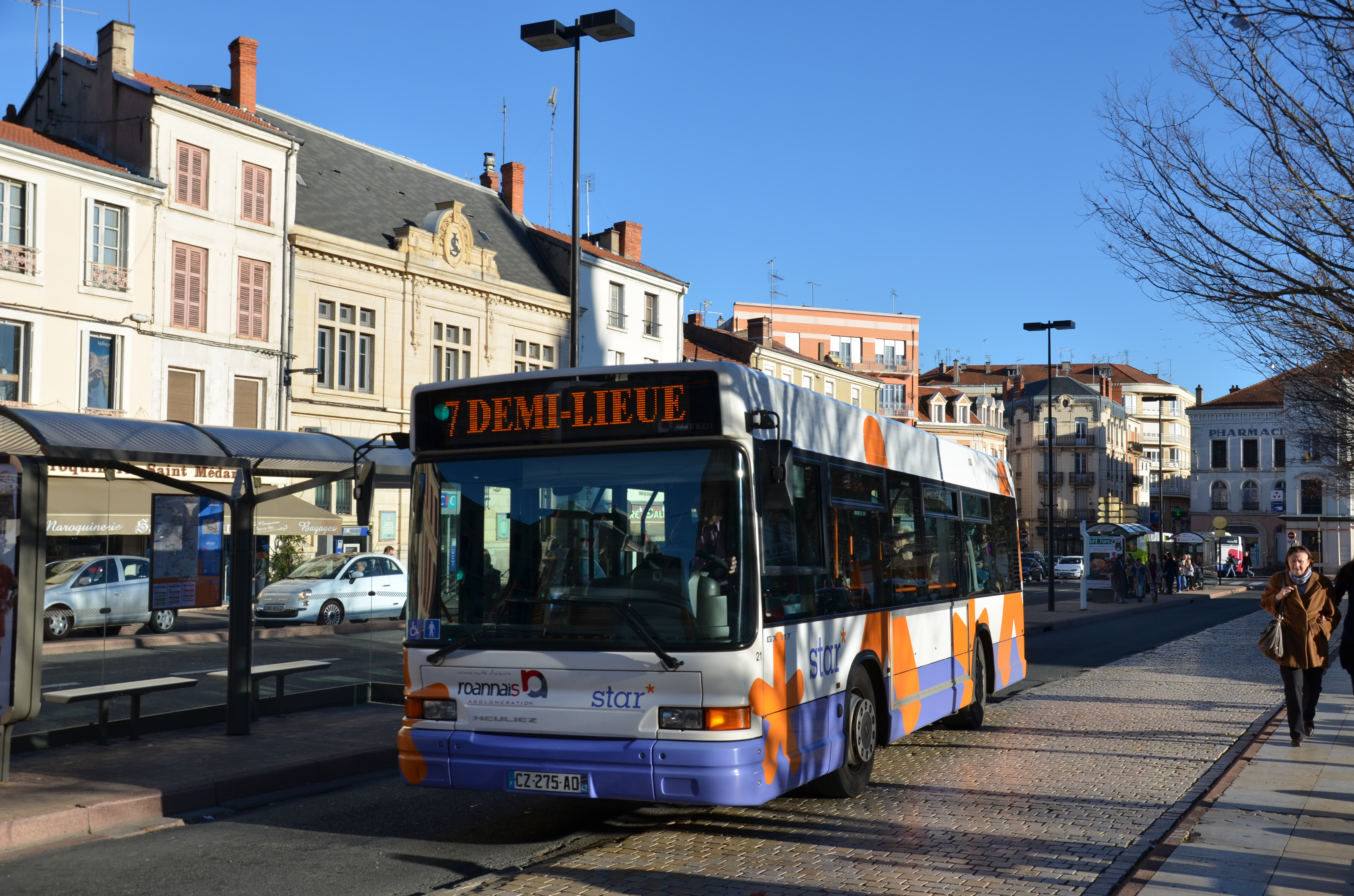 Heuliez GX 117 n°21 sur la ligne 7 du réseau STAR de Roanne, à la gare routière d'Hôtel de Ville.